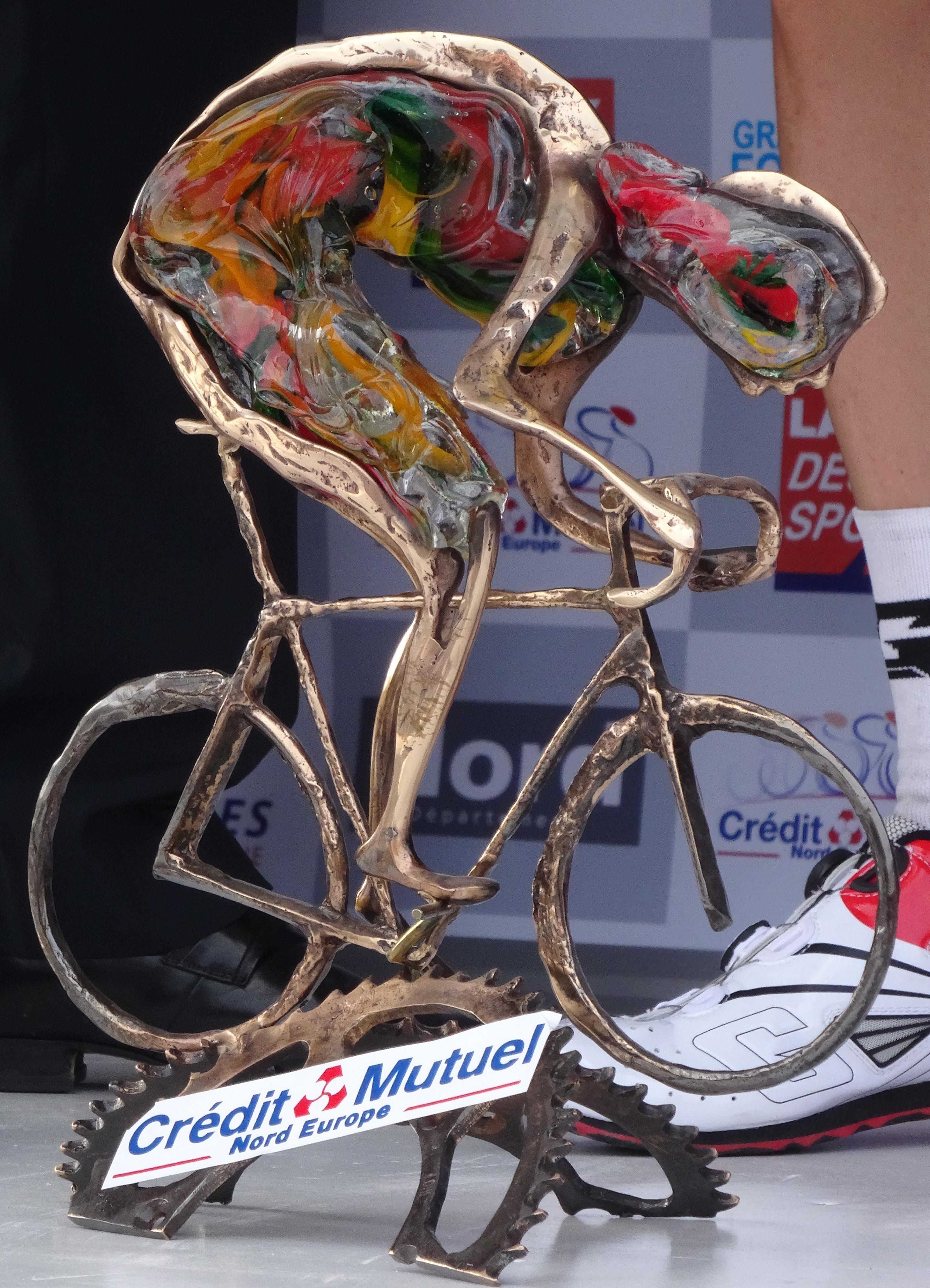 Reportage photographique réalisé le dimanche 7 septembre à l'occasion du départ et de l'arrivée du Grand Prix de Fourmies 2014 à Fourmies, Nord-Pas-de-Calais, France.